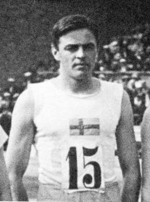 Klas Lundström, Stockholm Olympics